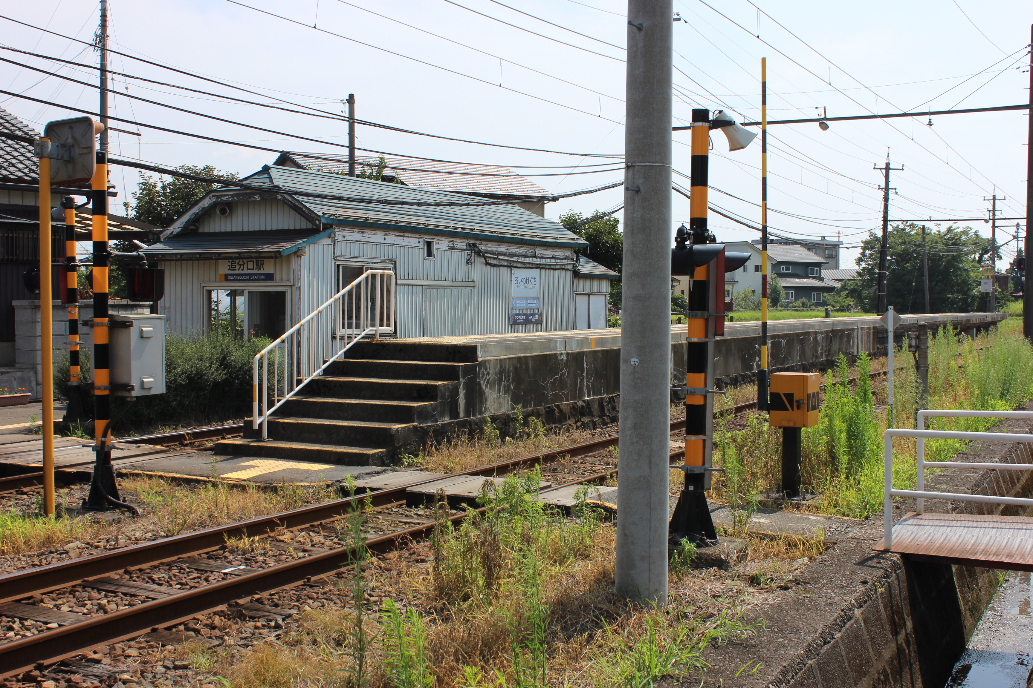 えちぜん鉄道勝山永平寺線追分口駅の駅舎・プラットホーム